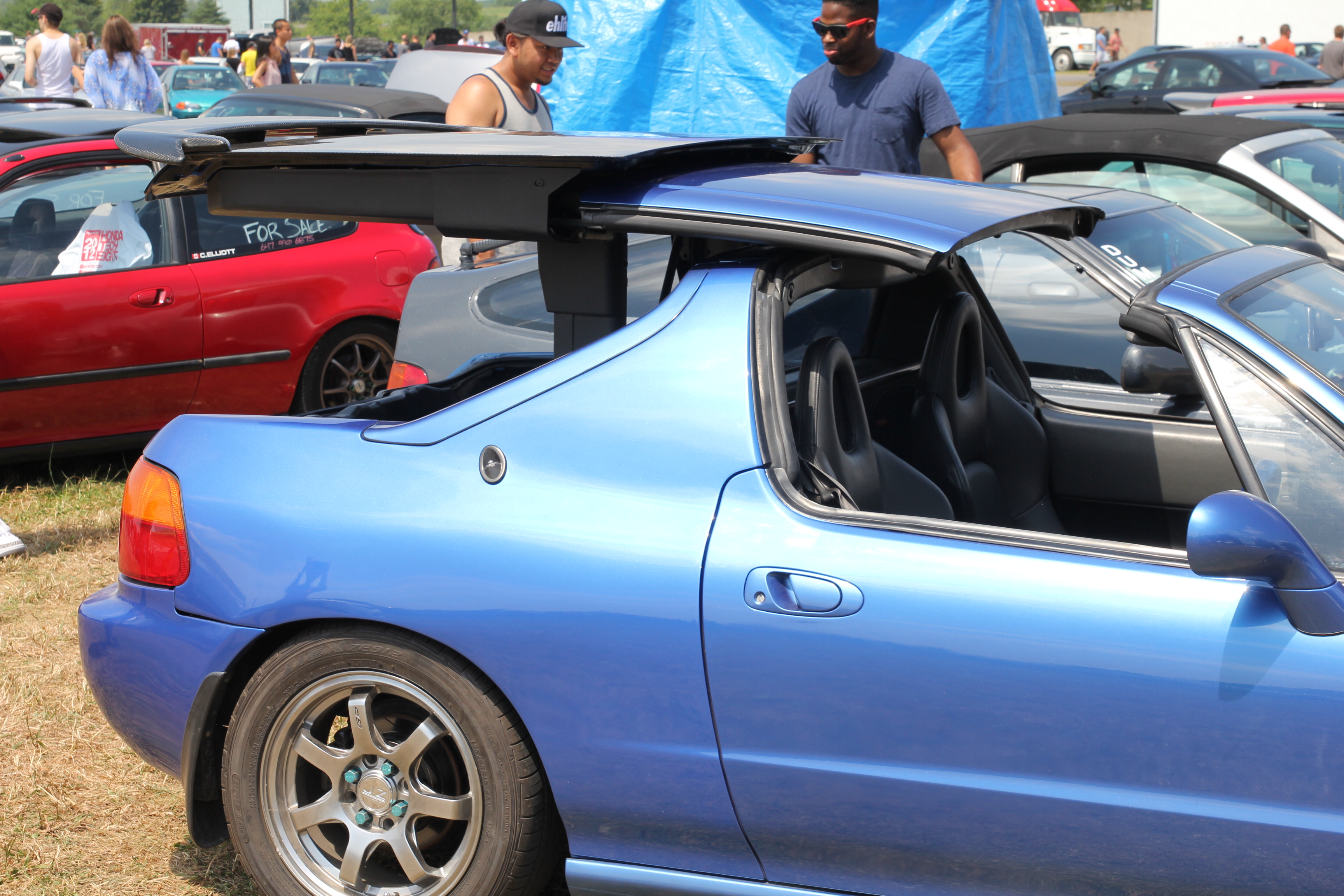 Toit amovible du Honda CR-X del Sol